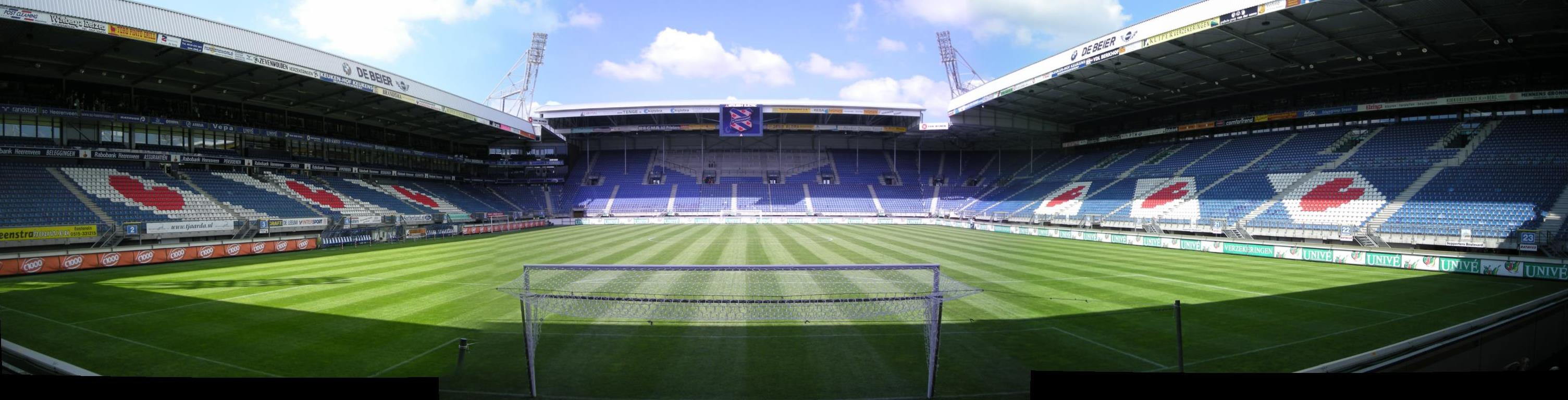 Abe Lenstra Stadion in Heerenveen (panorama)